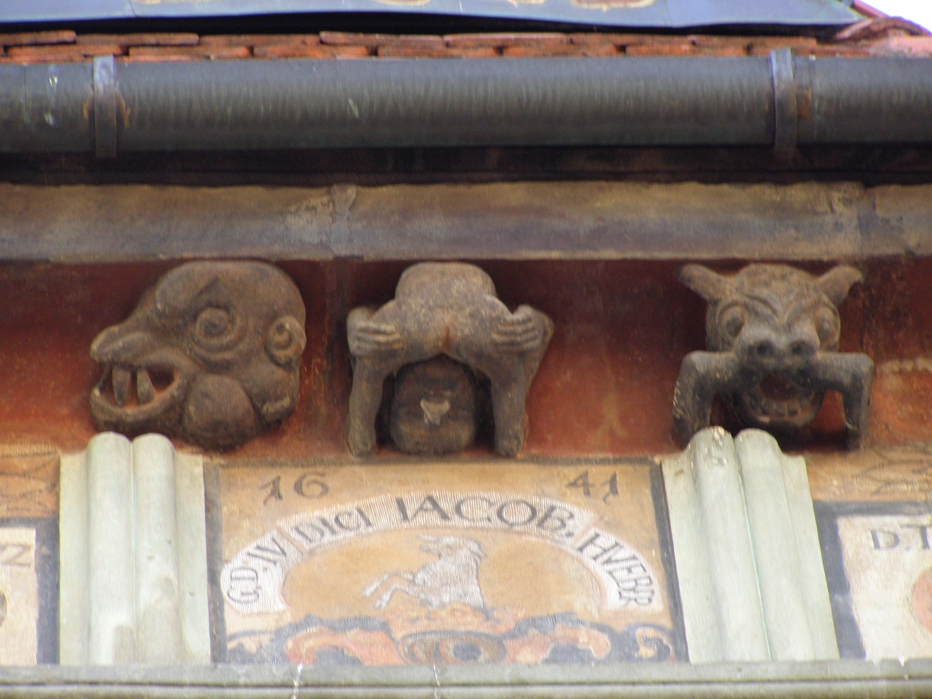 Detail radnice Bardejov